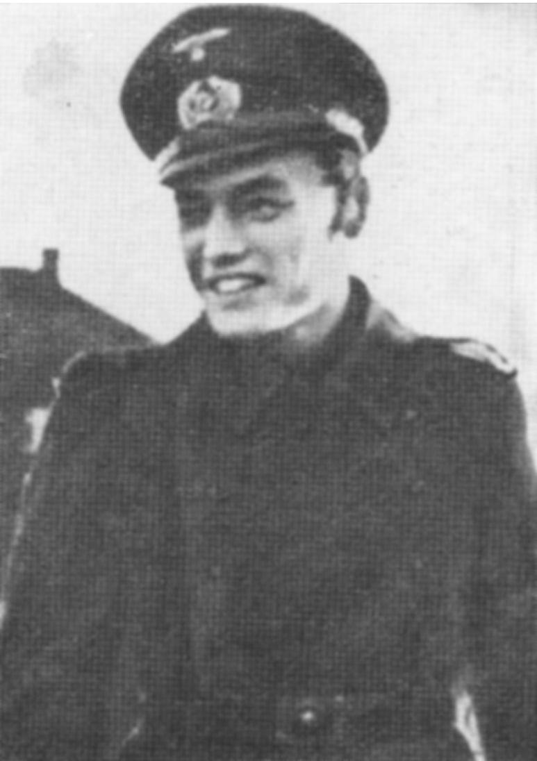 Хорст Хайльман, служил в отделе дешифровки вражеских радиостанций